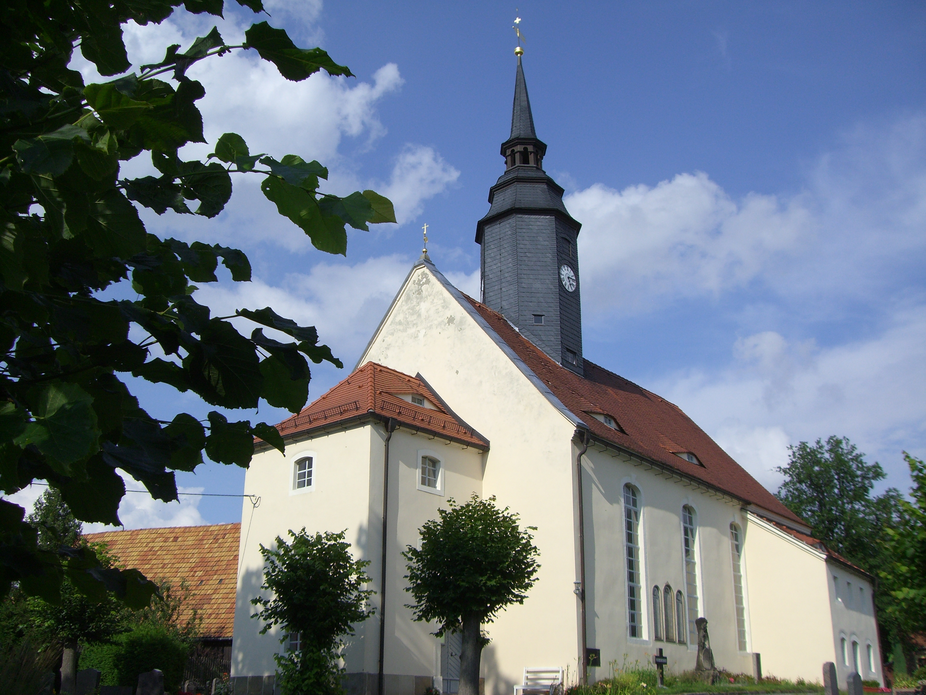 Kirche Niederschöna, Blick von Südwest